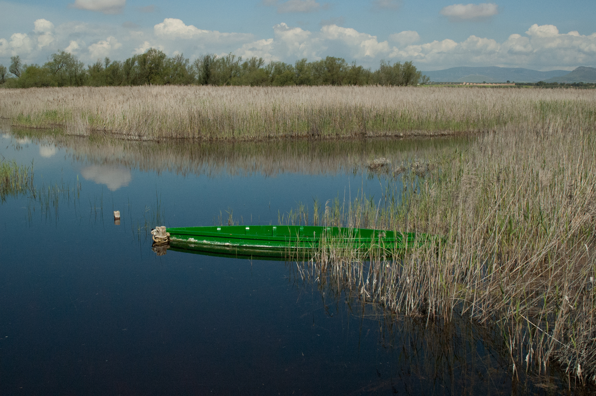 Tablas de Daimiel, Ciudad Real This is a photography of a Special Area of Conservation in Spain with the ID: ES0000013. Natura2000 entry, EEA entry